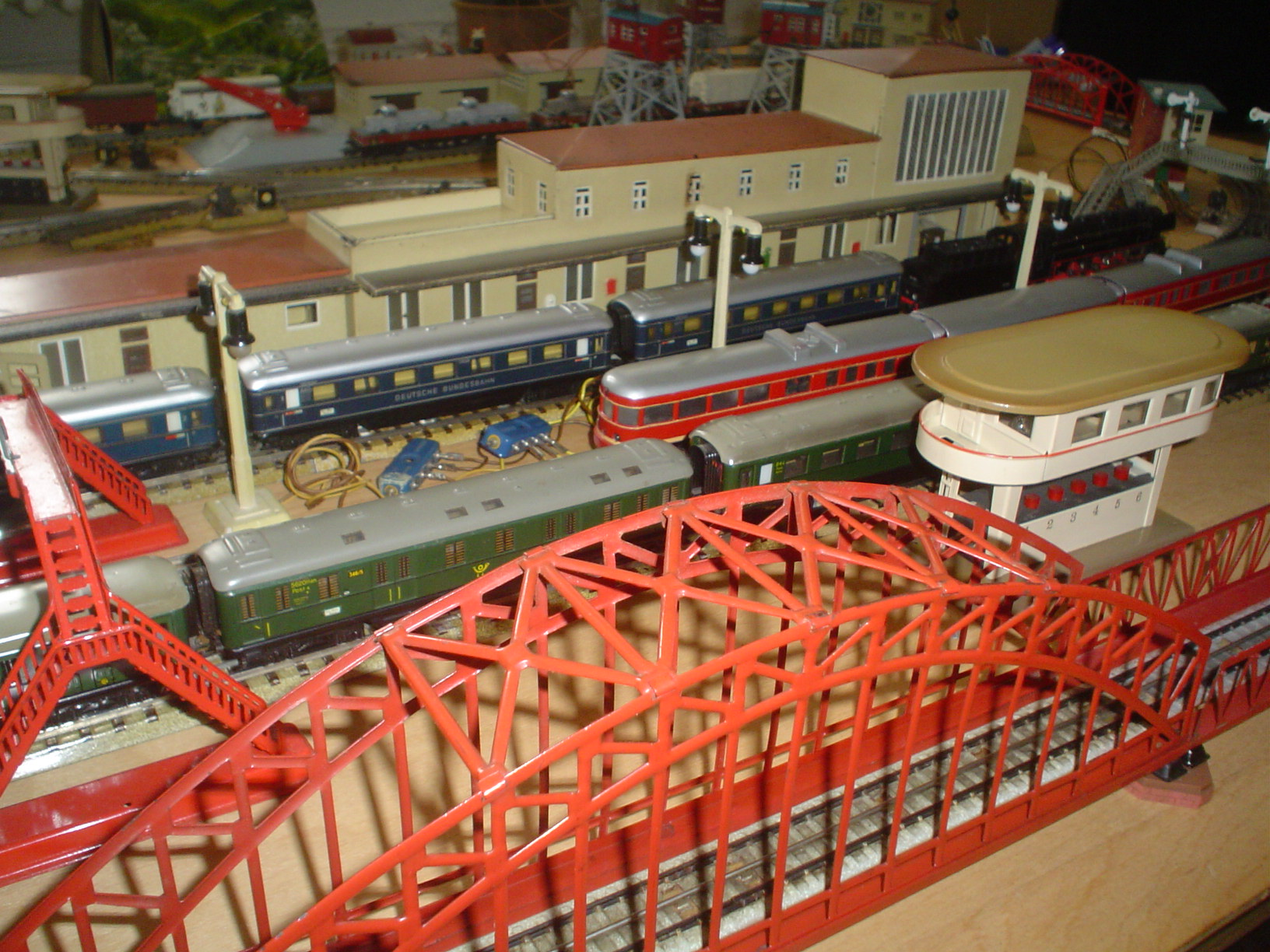 Märklin Material aus den 50er Jahren